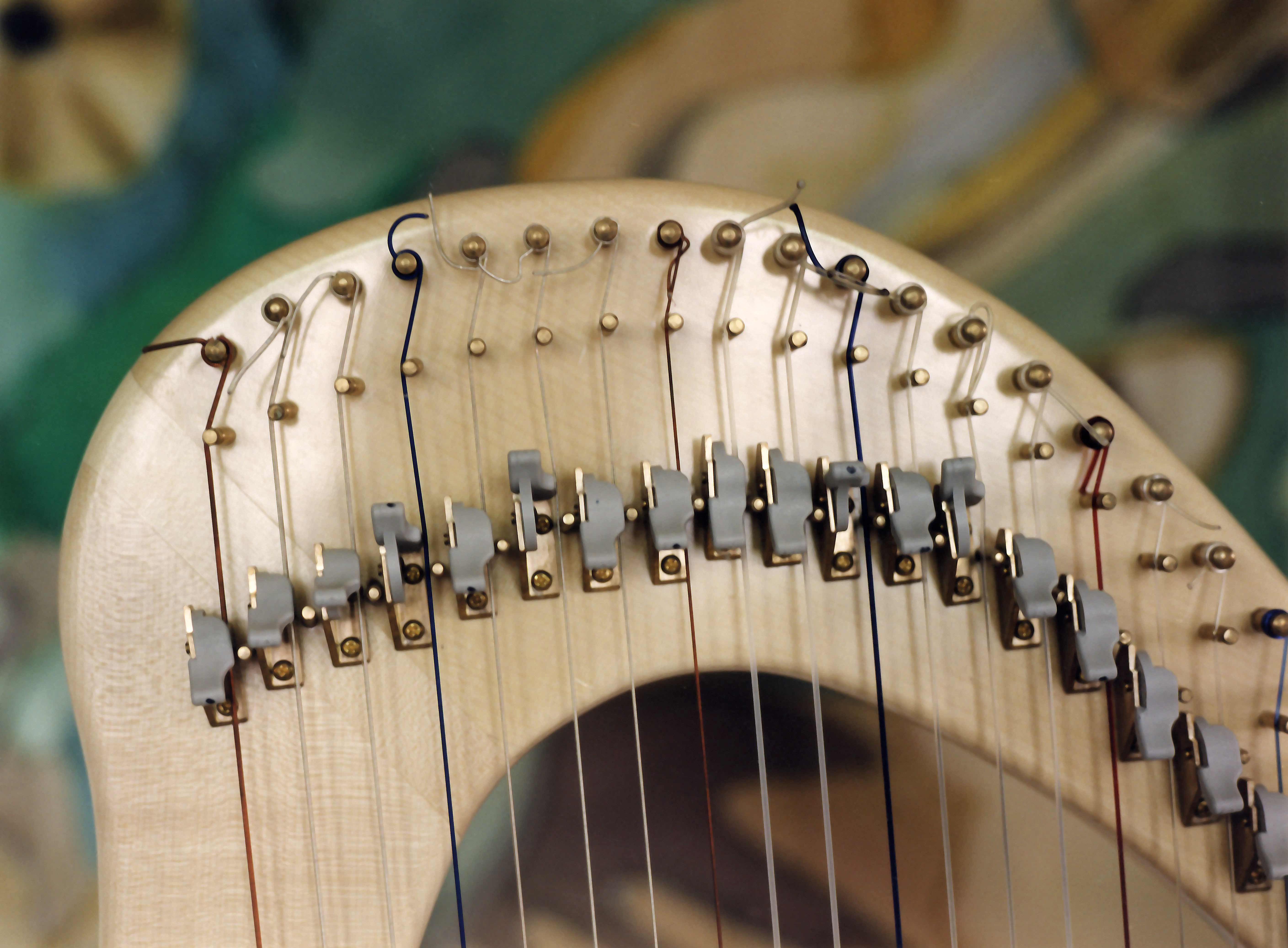 Keltische Harfe mit Halbtonklappen (Detail)